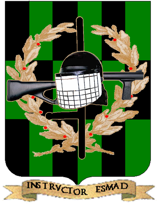 Instructor